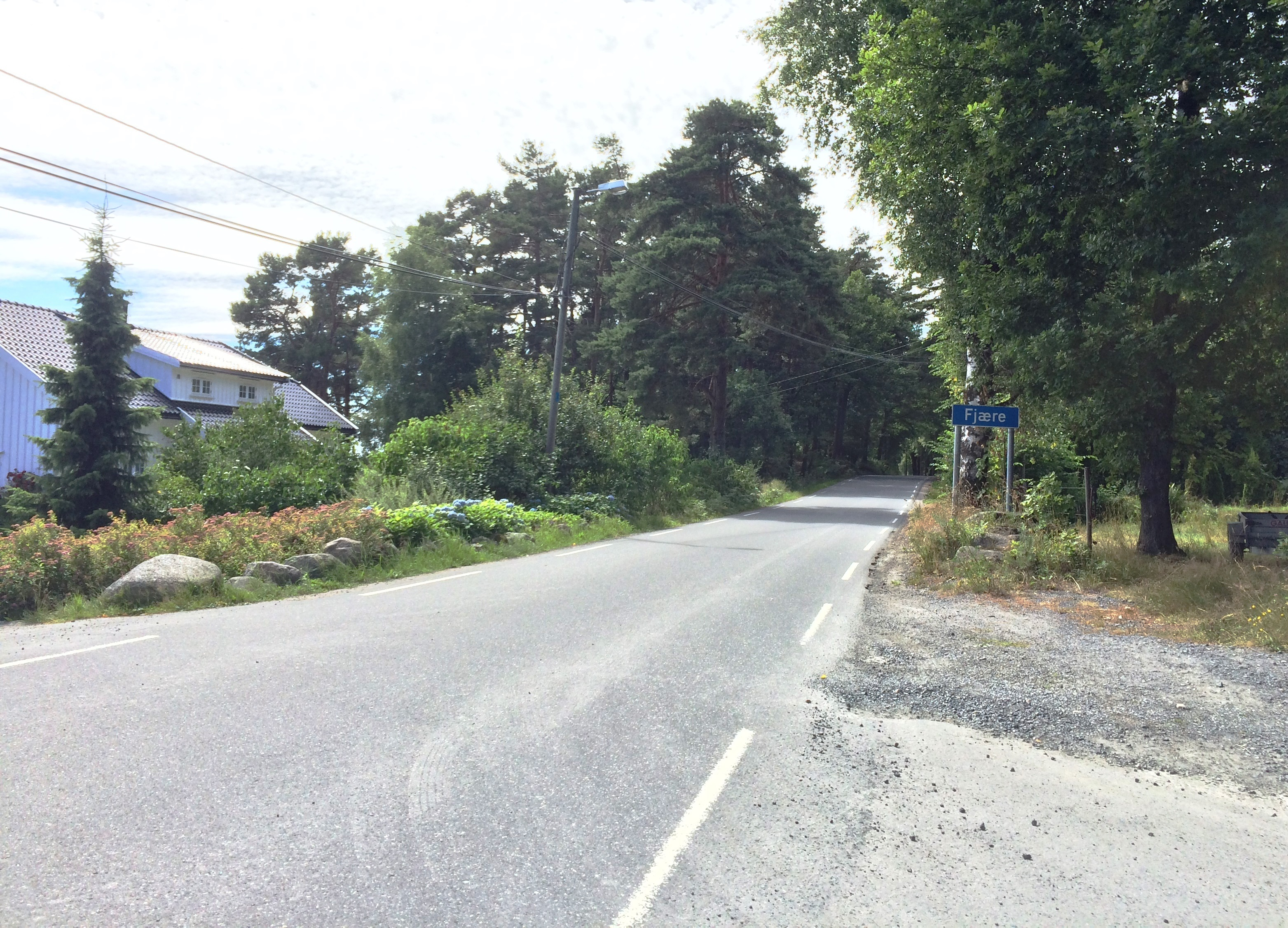 Fylkesvei 33 i Fjære i Grimstad kommune